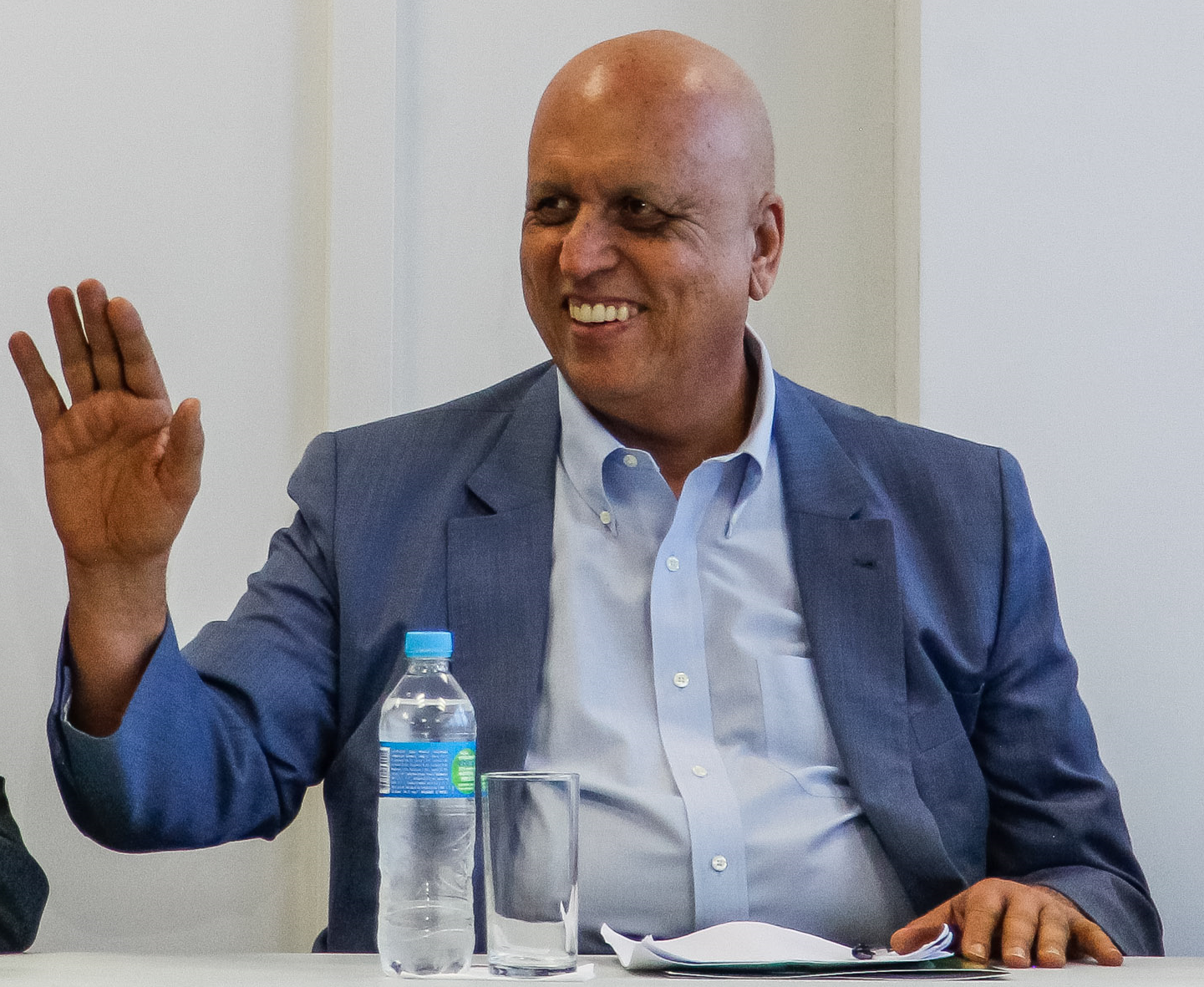 Em evento das Olimpíadas, O Governador Licenciado Luiz Fernando Pezão, em recuperação de um tratamento de câncer.